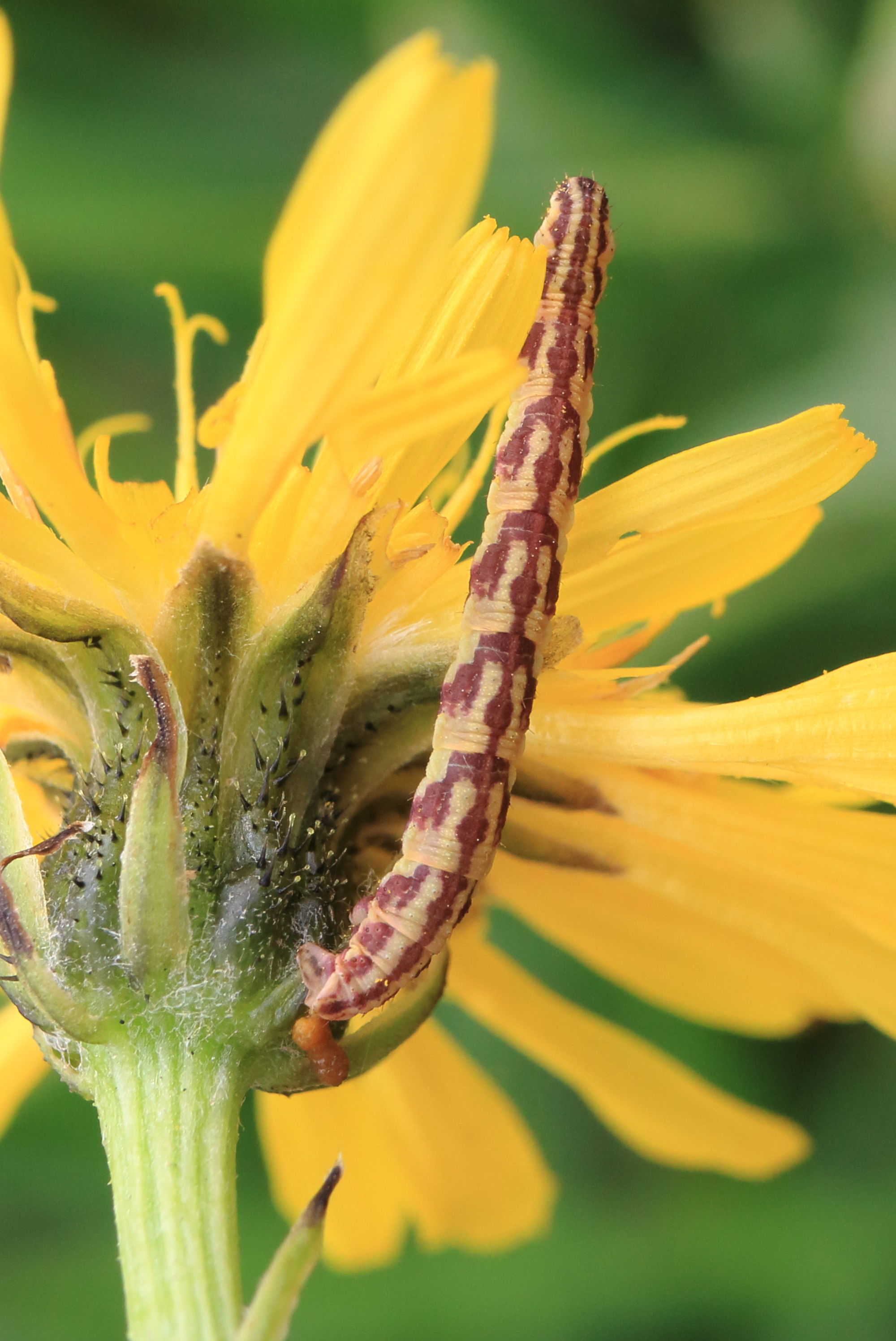 Raupe des Mondfleckigen Blütenspanners Eupithecia centaureata, gefunden auf Wiese am Haus, Länge ca. 35-40mm Der abgebildete Schmetterling wurde am 26. September 2015 von Tina Schulz auf lepiforum.de bestimmt, auf Grund meiner (Norbert) Anfrage dort vom 26. September 2015 The butterfly shown here has been identified from Tina Schulz on lepiforum.de 2015, September 26th, my (Norbert) question there dated 2015, September 26th